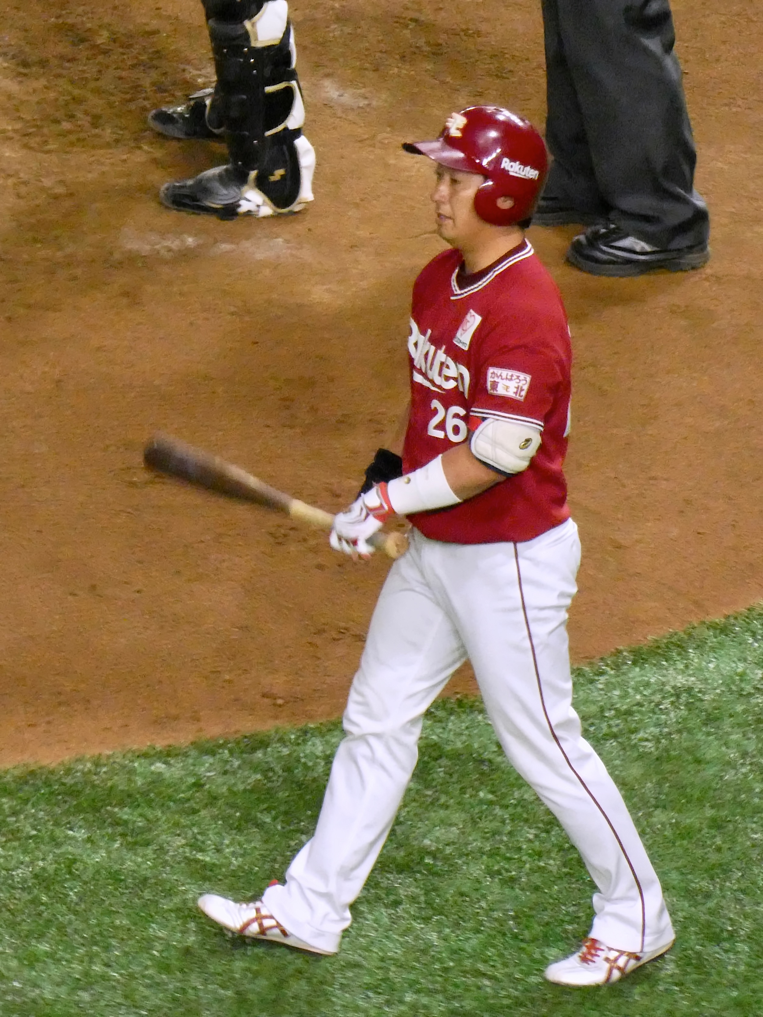 東北楽天ゴールデンイーグルスの選手「渡辺直人」。東京ドームにて。